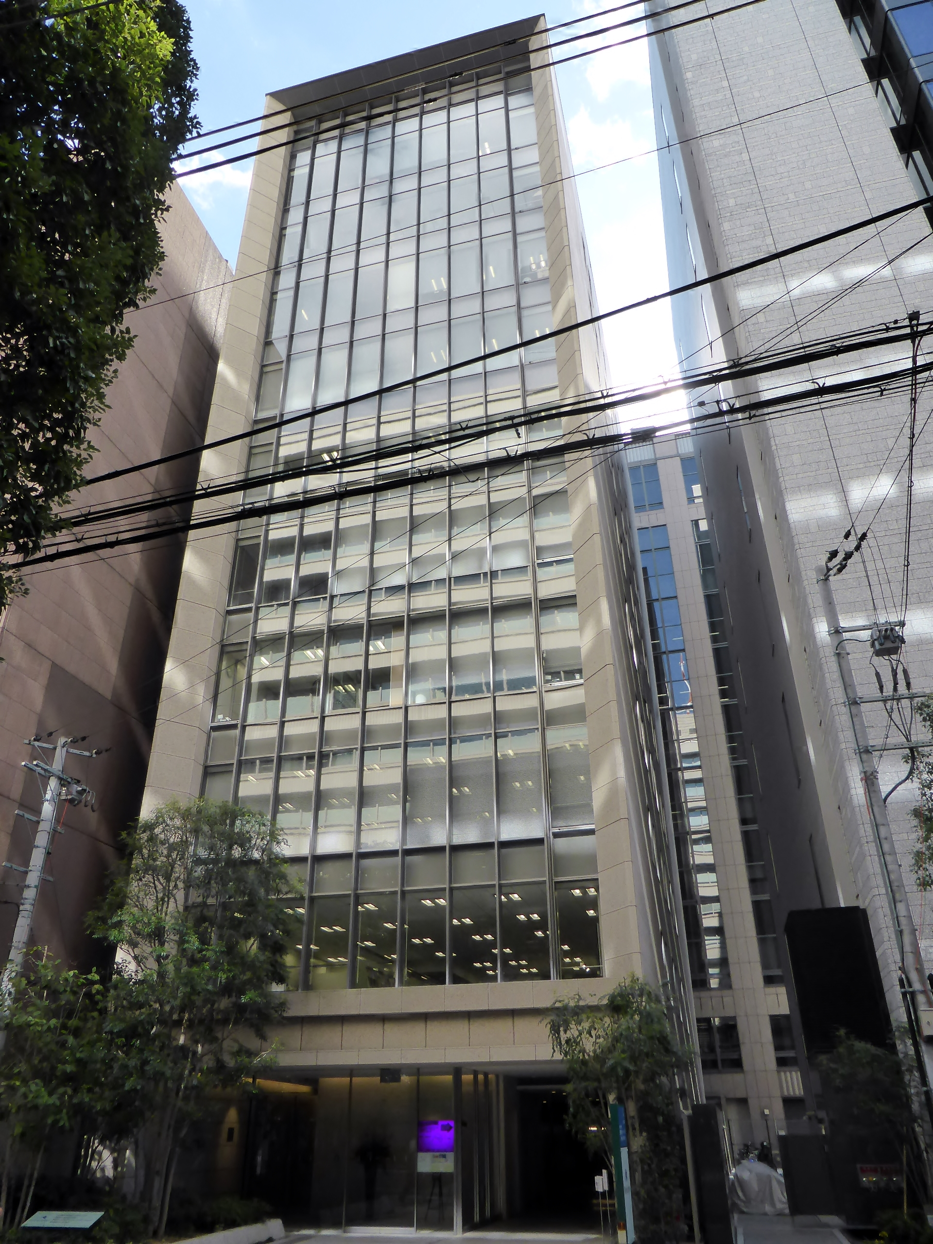 株式会社船井総合研究所本社を撮影。